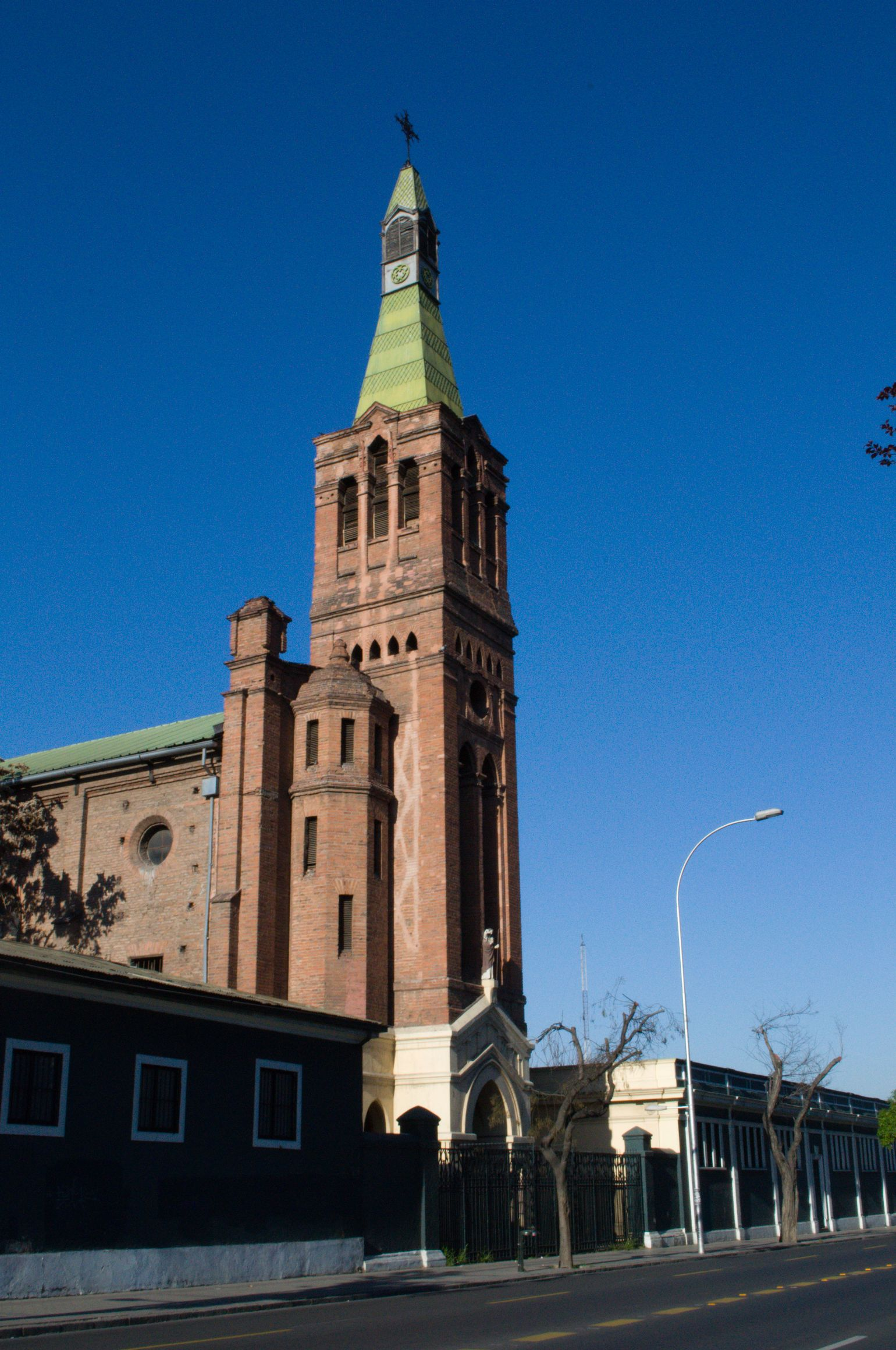 Iglesia del Santísimo Sacramento, vista desde Avenida Manuel Antonio Matta hacia el poniente This is a photo of a national monument in Chile: 866